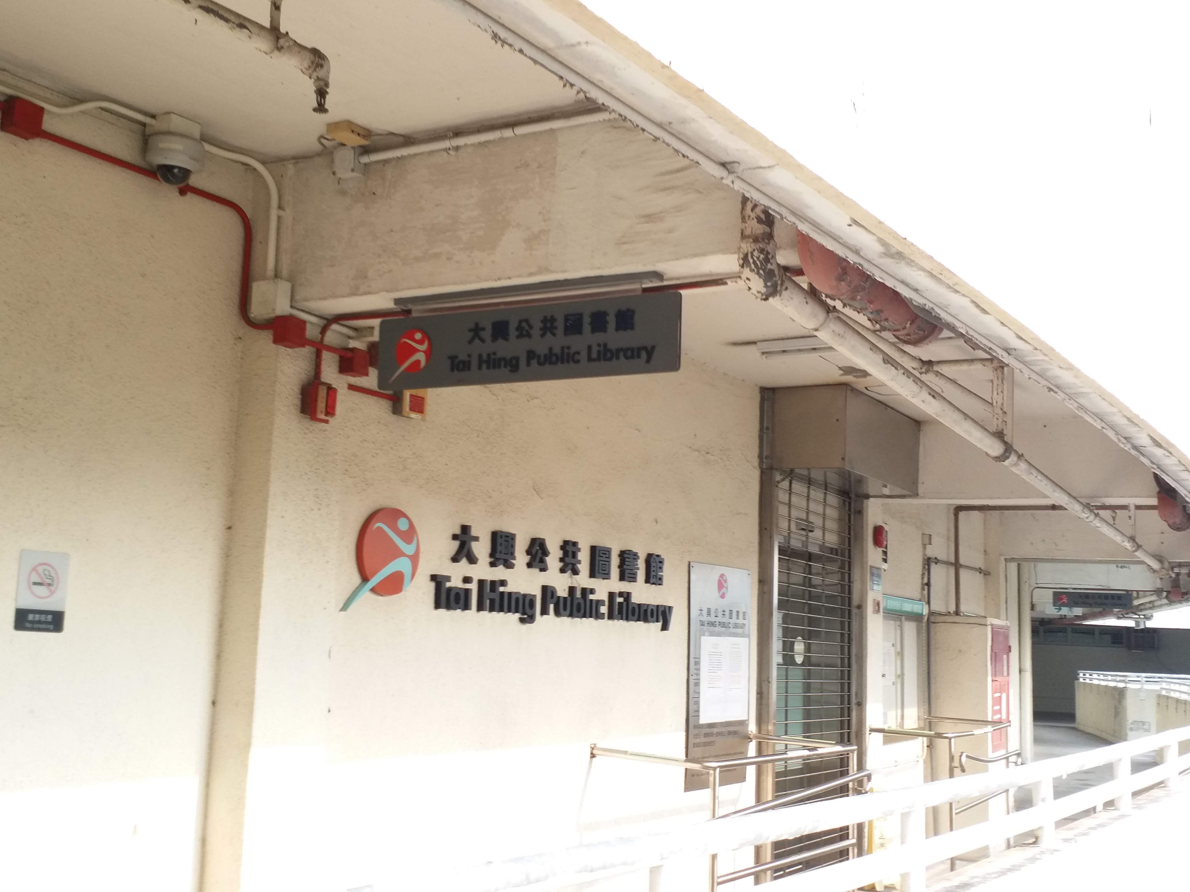 位於大興邨內 商場二樓的大興公共圖書館